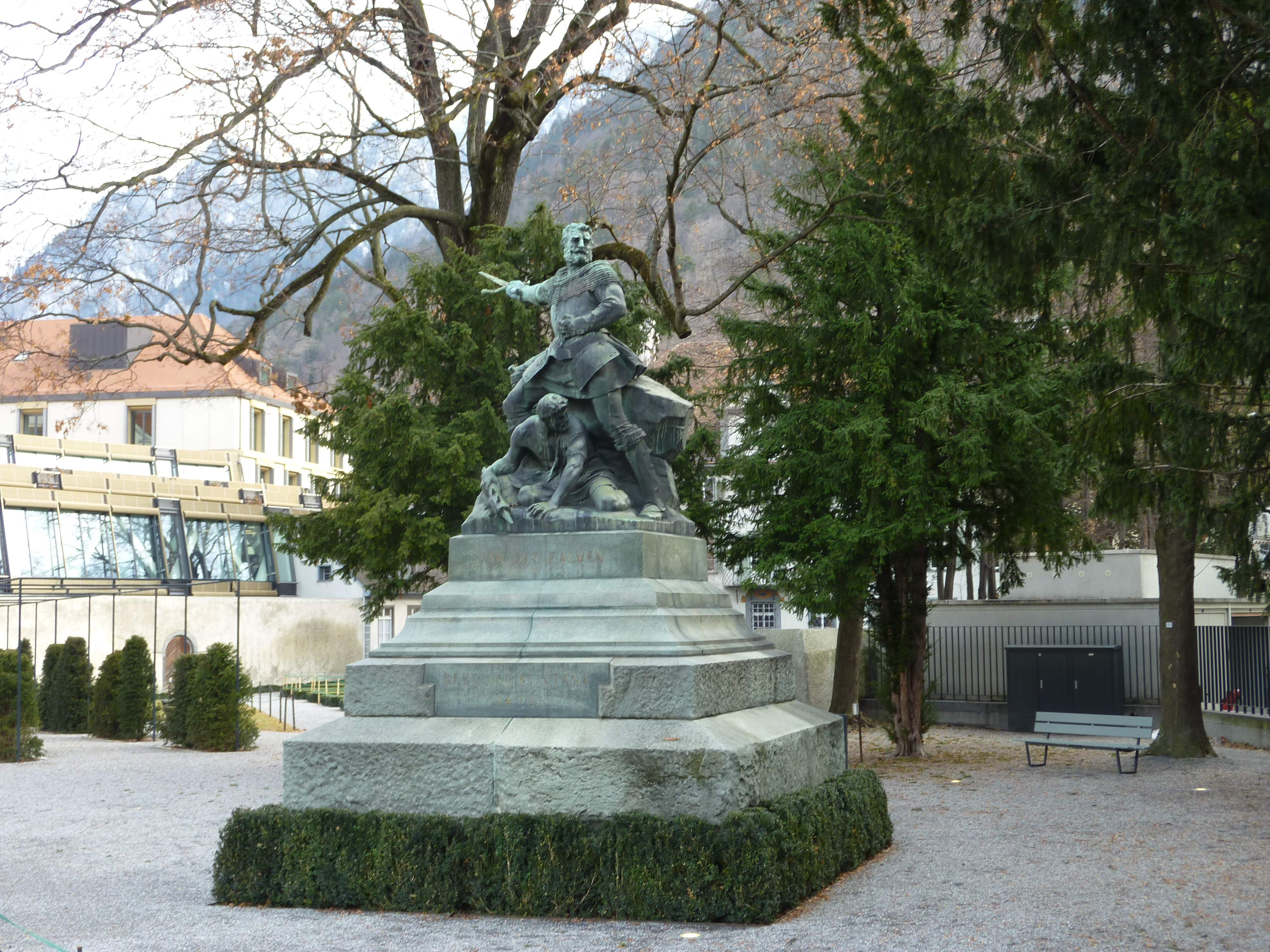 Denkmal